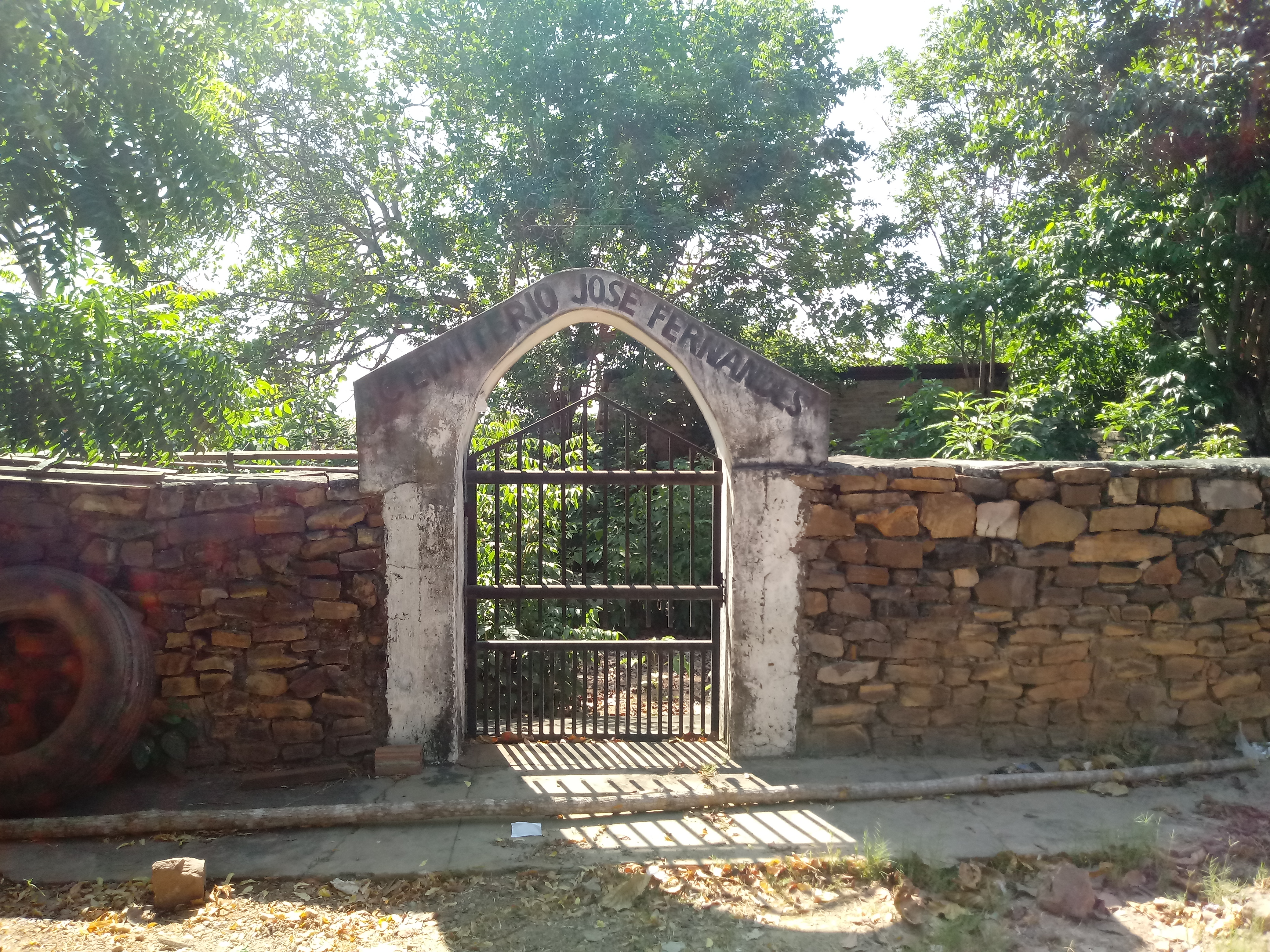 Cemitério José Fernandes, é um cemitério histórico e foi o primeiro cemitério de Capitão de Campos